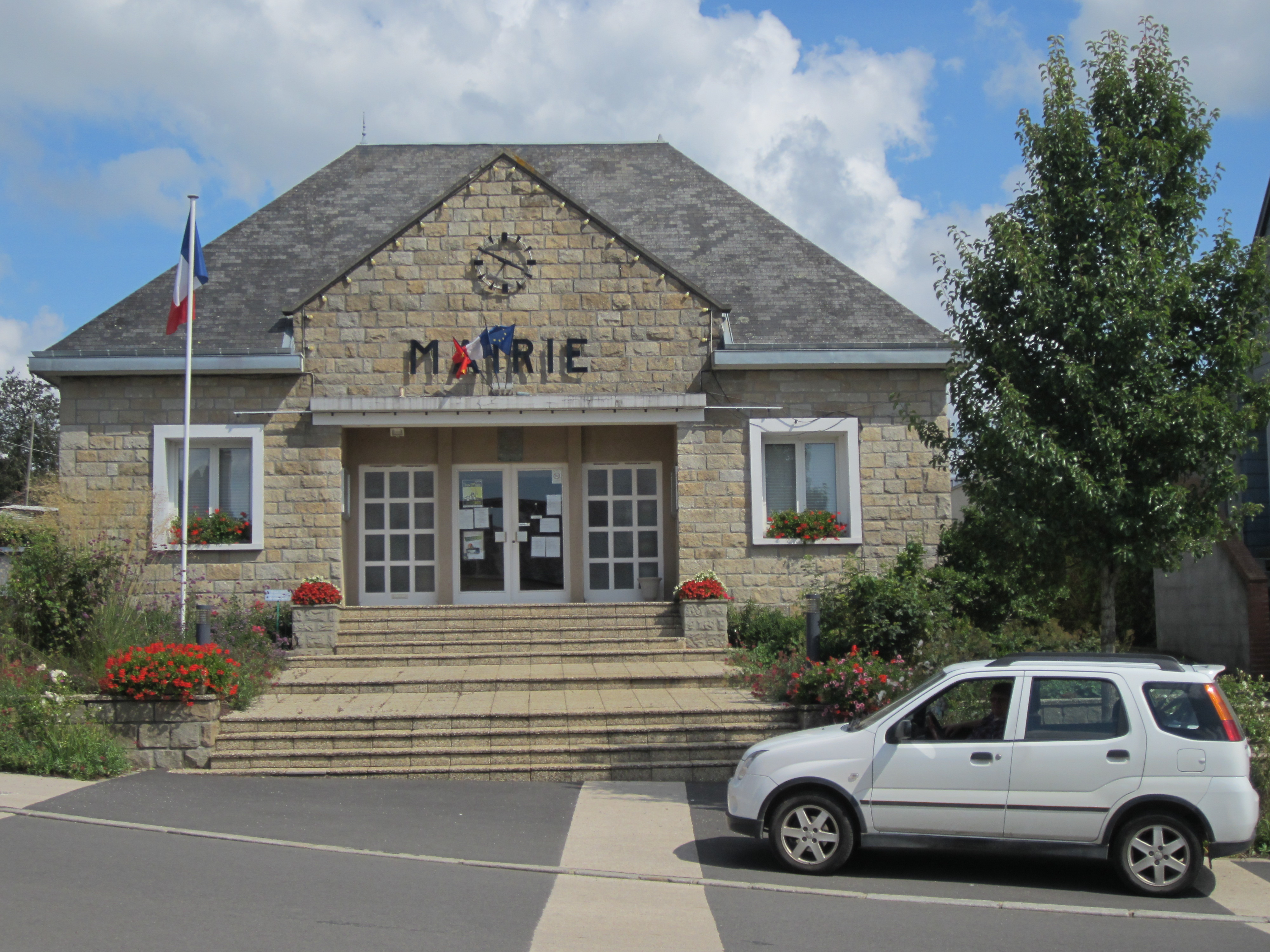 Église Notre-Dame de Romagny, Manche